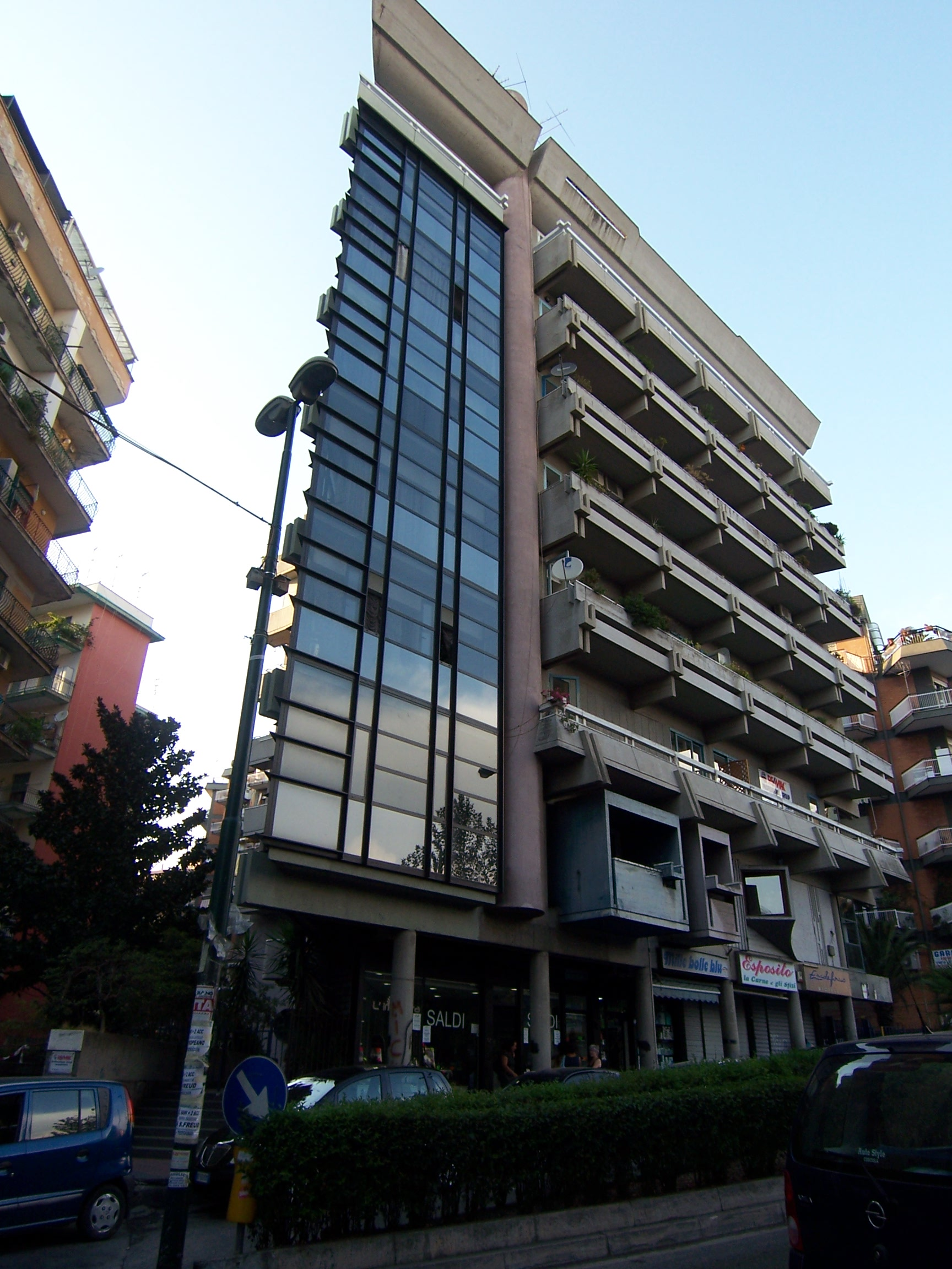 Edificio residenziale al Rione Alto, nel quartiere Arenella a Napoli - Architetto Aldo Loris Rossi